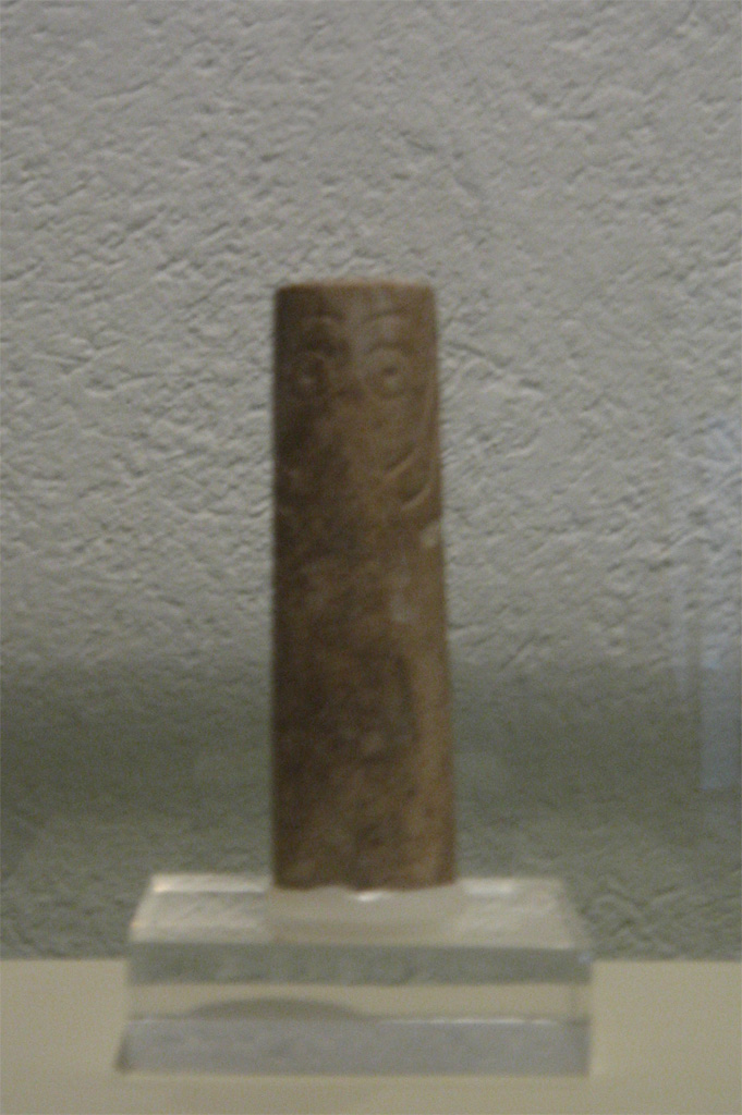 ídolo cilíndrico del Cortijo de la fuente de Sanlúcar de Barrameda-Provincia de Cádiz-Andalucía-España